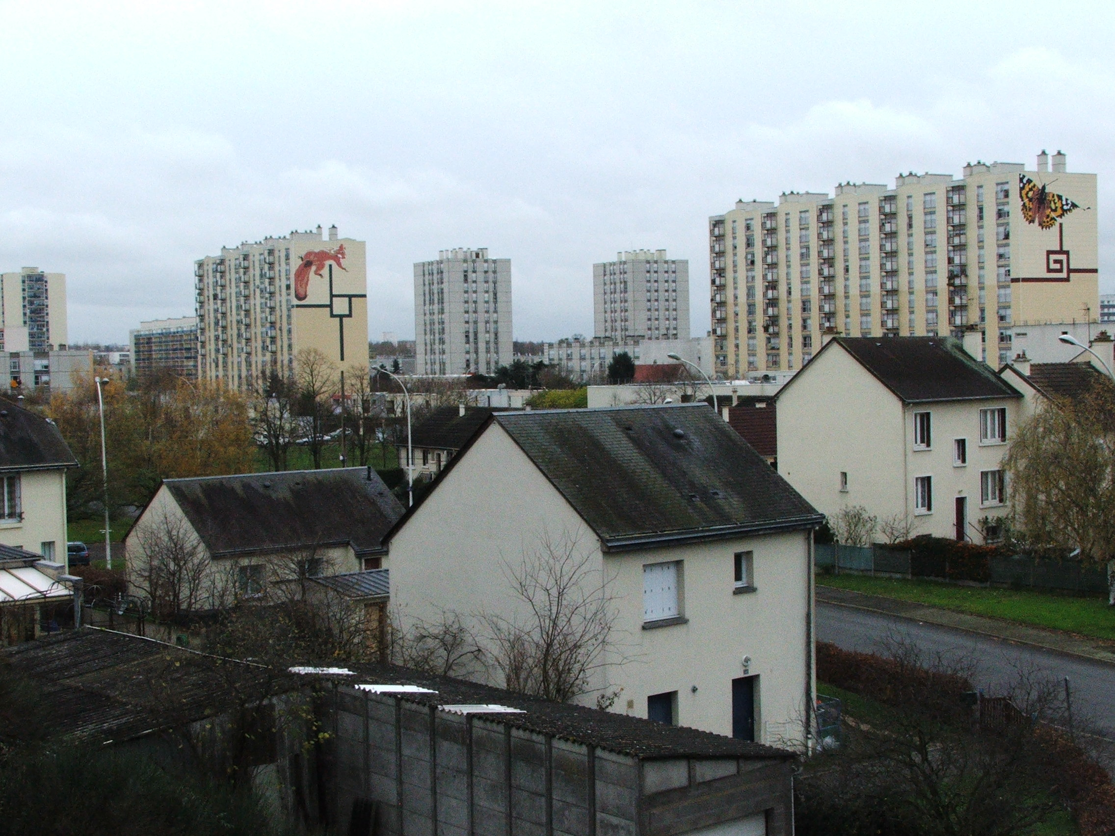 Les Sablons au sud-est du Mans, représentatif des Grands ensembles français.